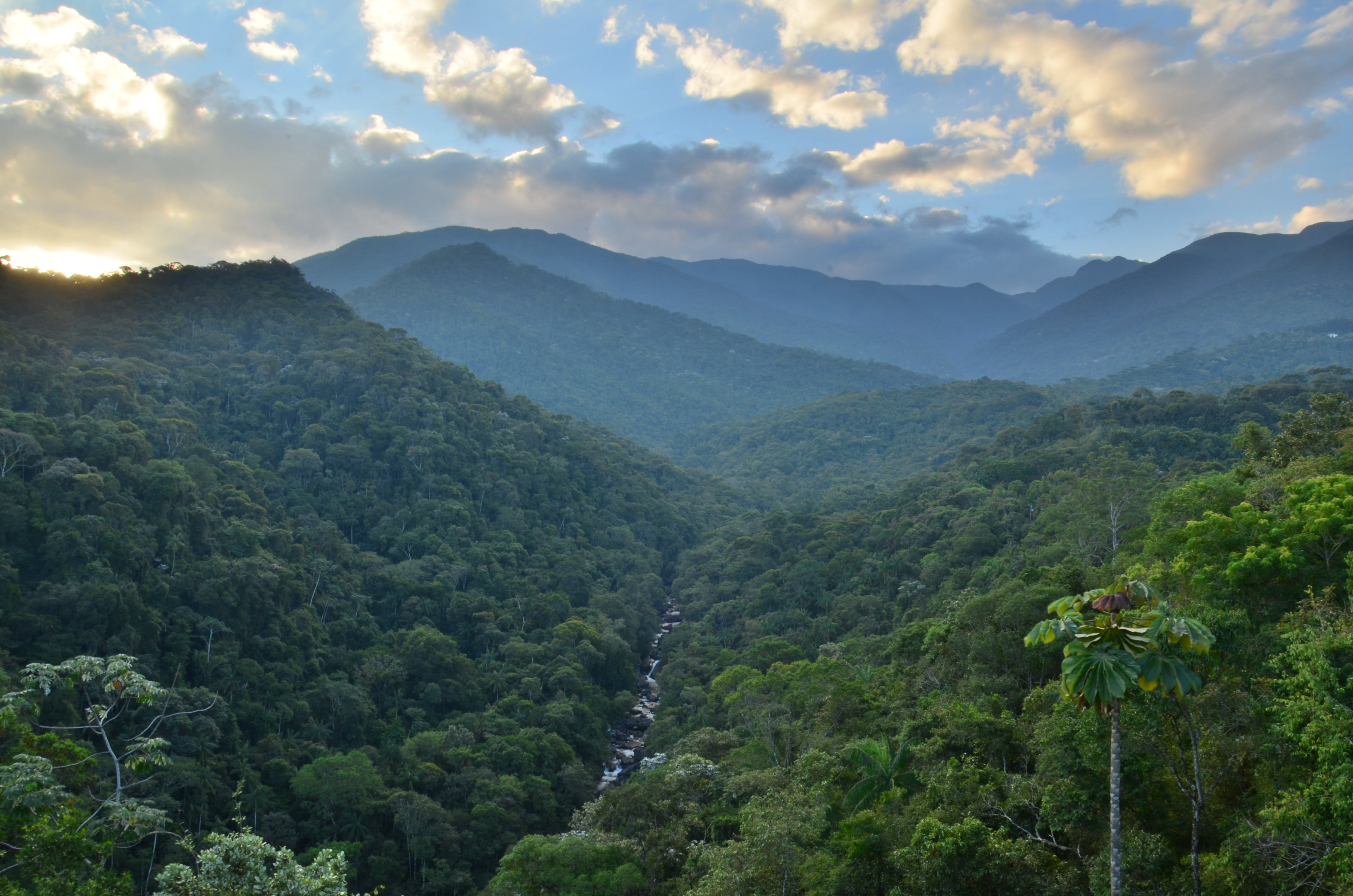 Parque Nacional de Itatiaia